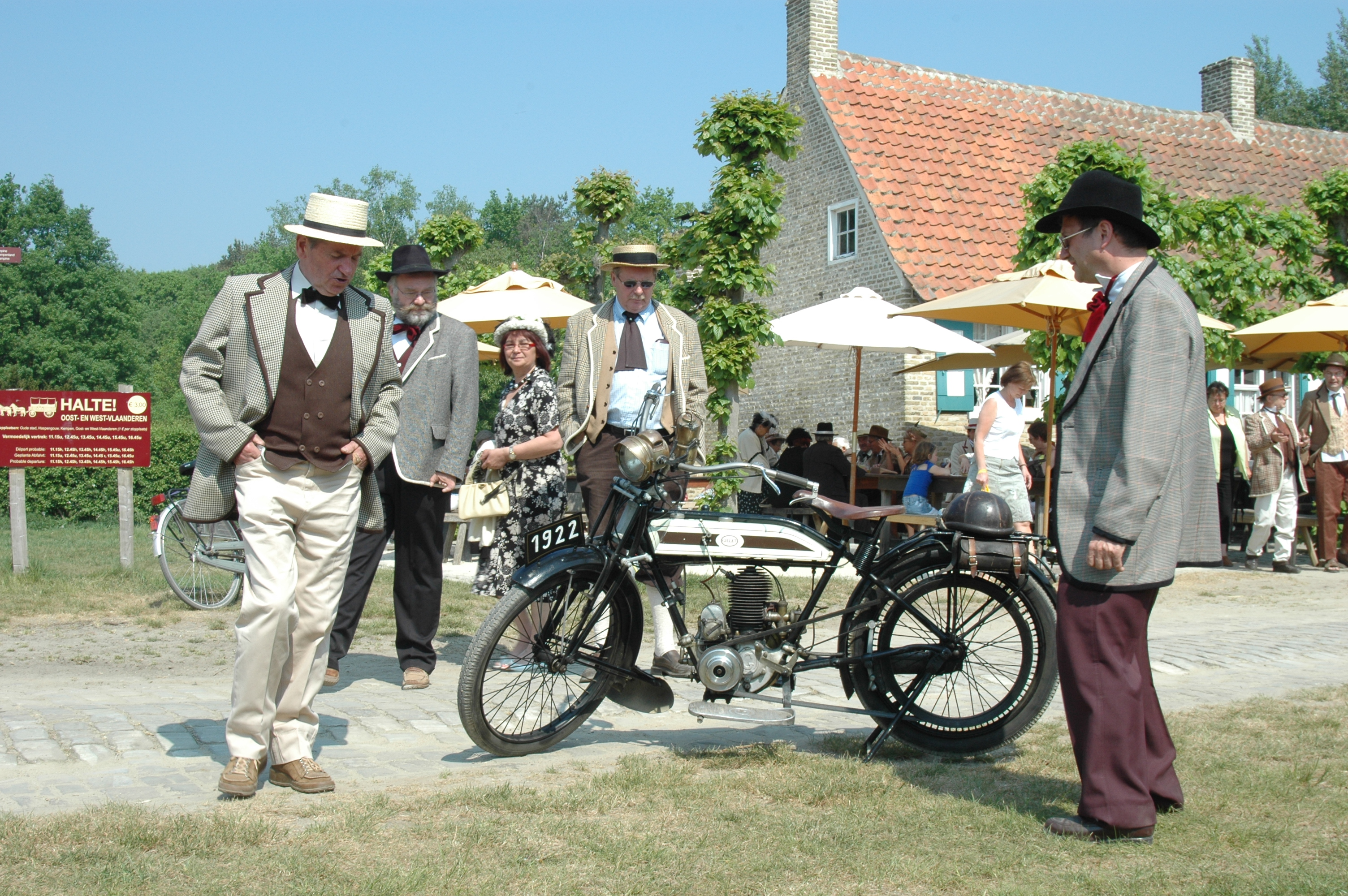 re-enactment event, Open-Air Museum Bokrijk, living history